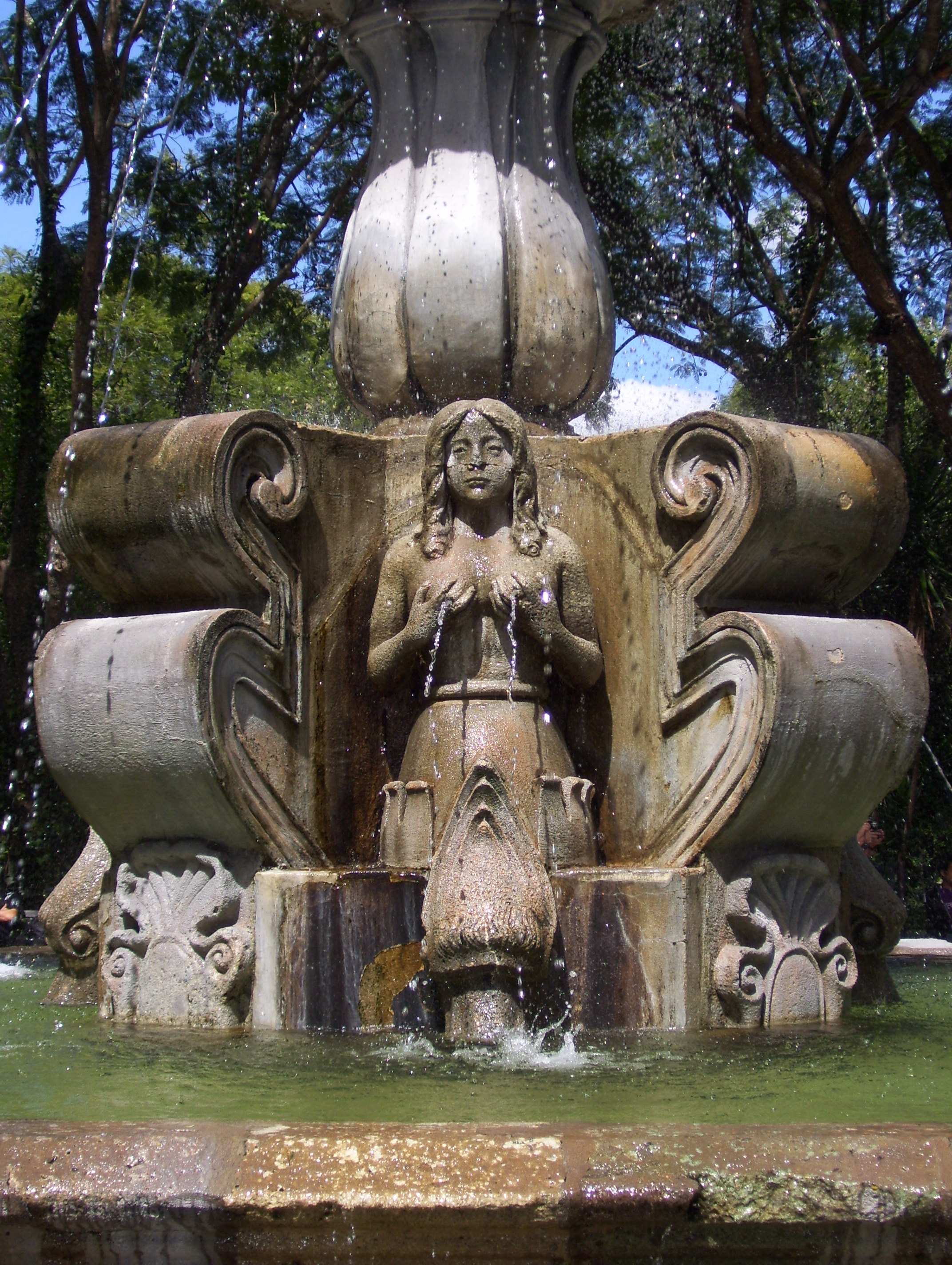 Fuente de las Sirenas, construida en 1739 y colocada por Diego de Porres; plaza central de la ciudad de Antigua Guatemala